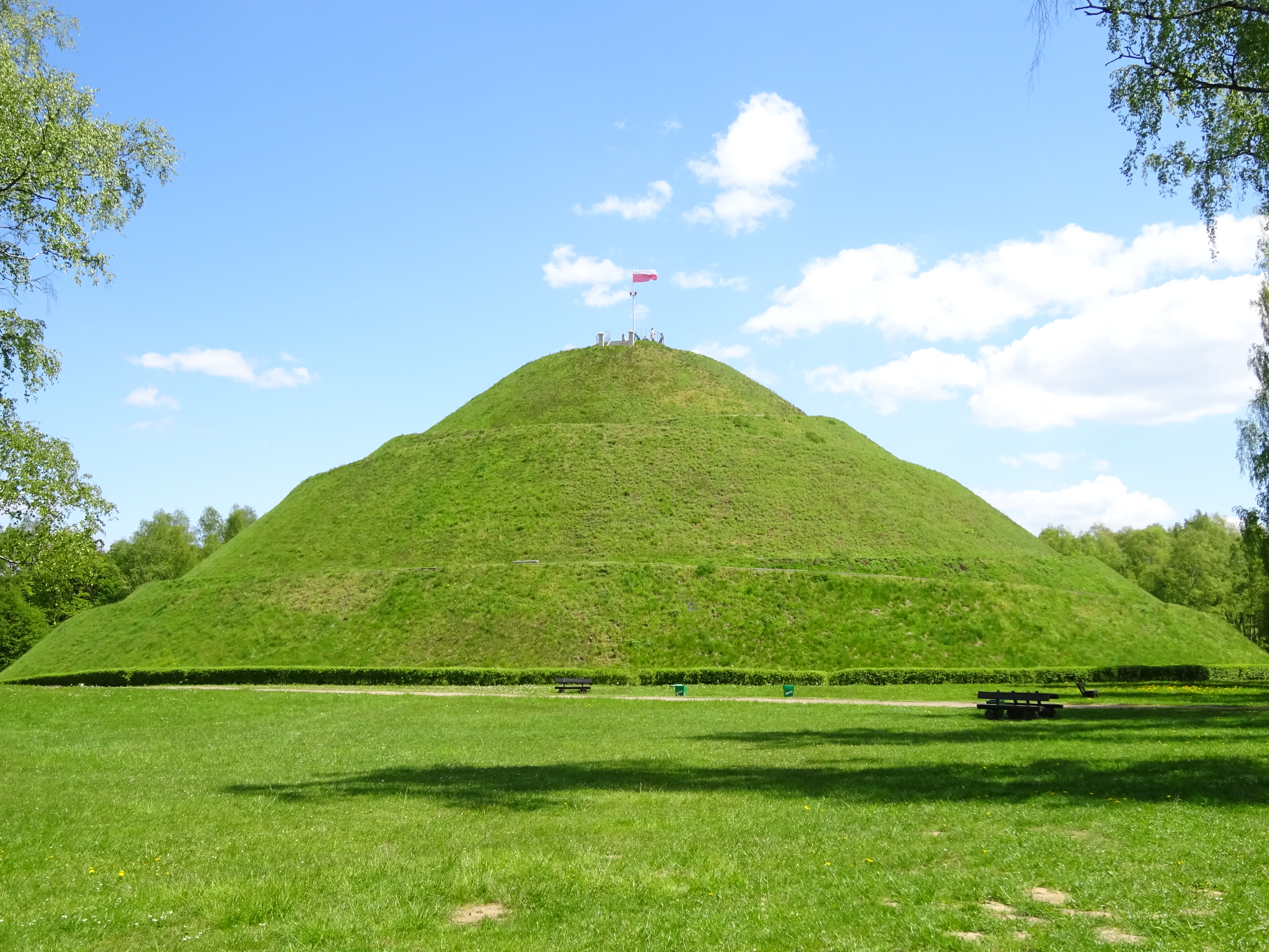 Kopiec Piłsudskiego w Krakowie. Widok od strony zachodniej. 2016